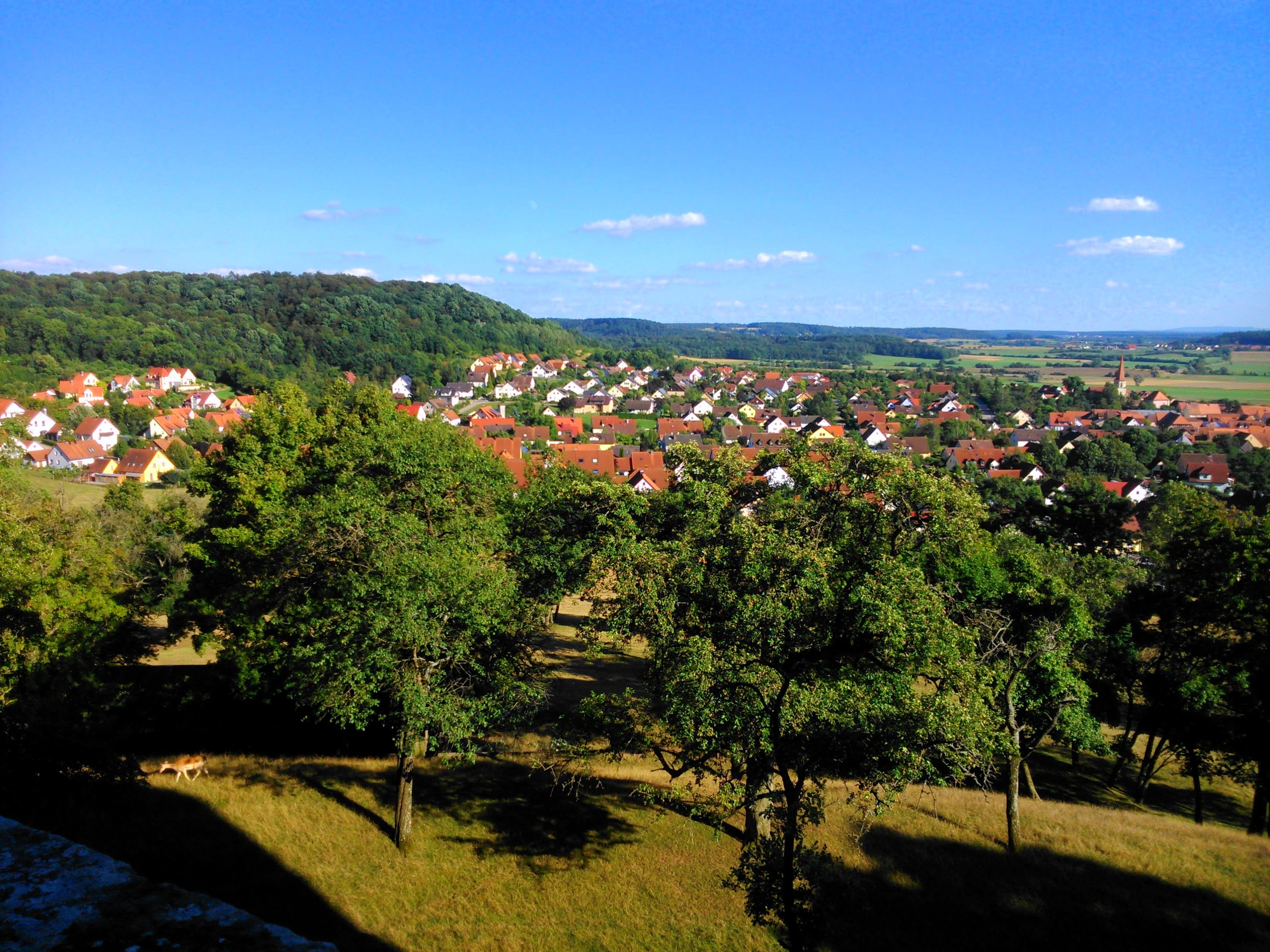 Village Colmberg